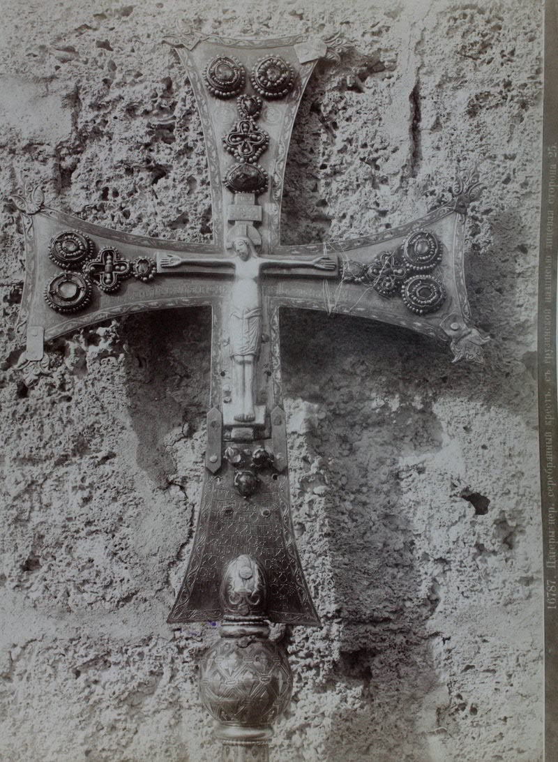 იშხნის საწინამძღვრო ჯვარი